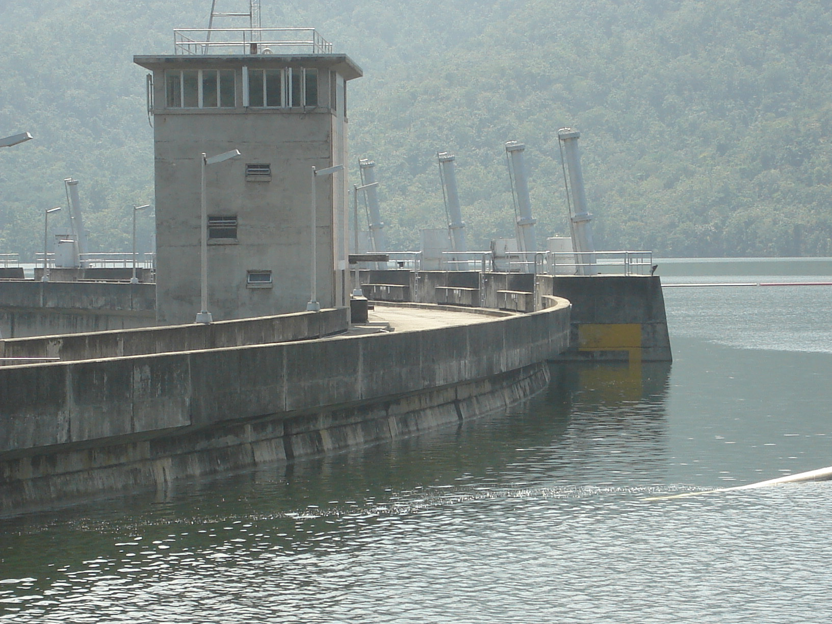 Bhumibol Dam (เขื่อนภูมิพล) in Tak, Thailand